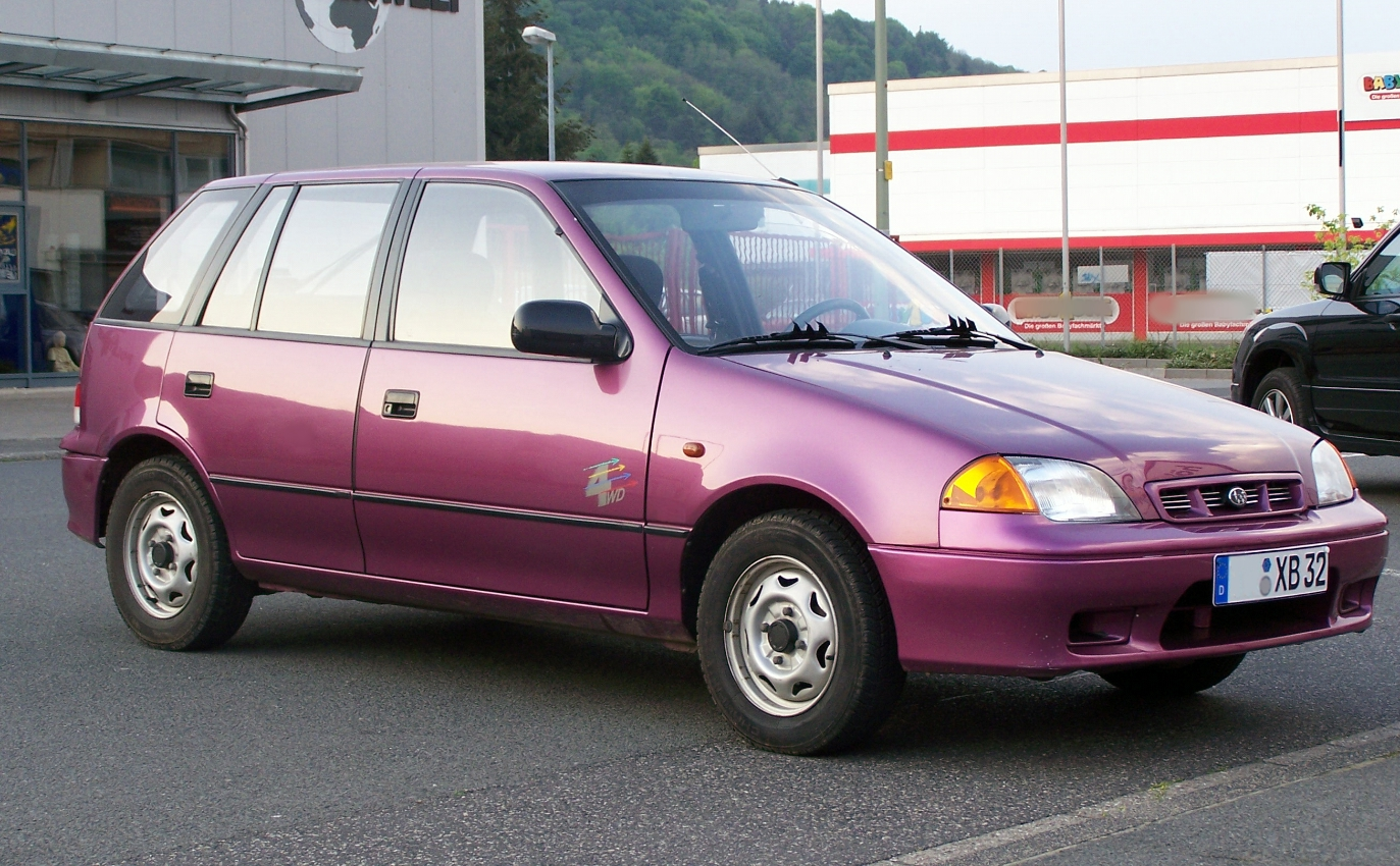 Subaru Justy 1.3 GX 4WD Baujahr 1997